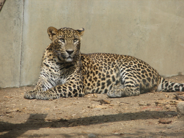 Sri Lanka Leopard, in ZOO Jihlava, Czech Republic